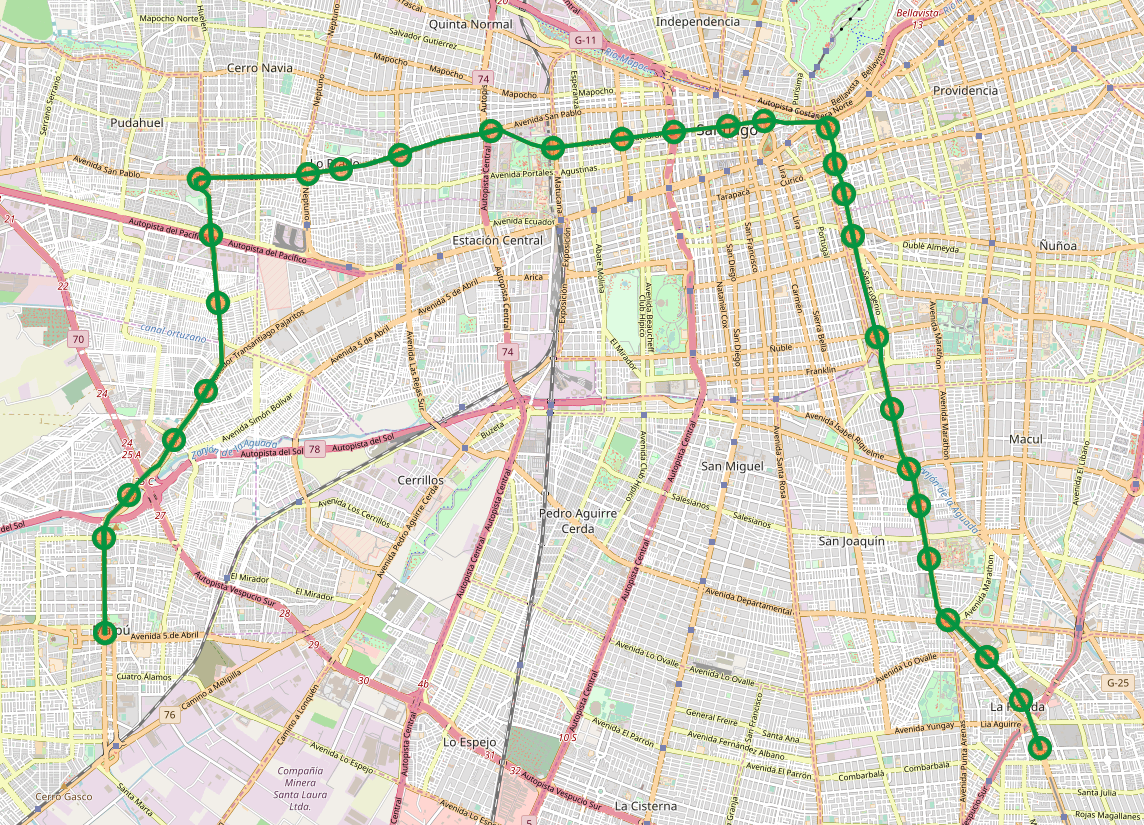 Mapa con el recorrido de la Línea 5 del Metro de Santiago